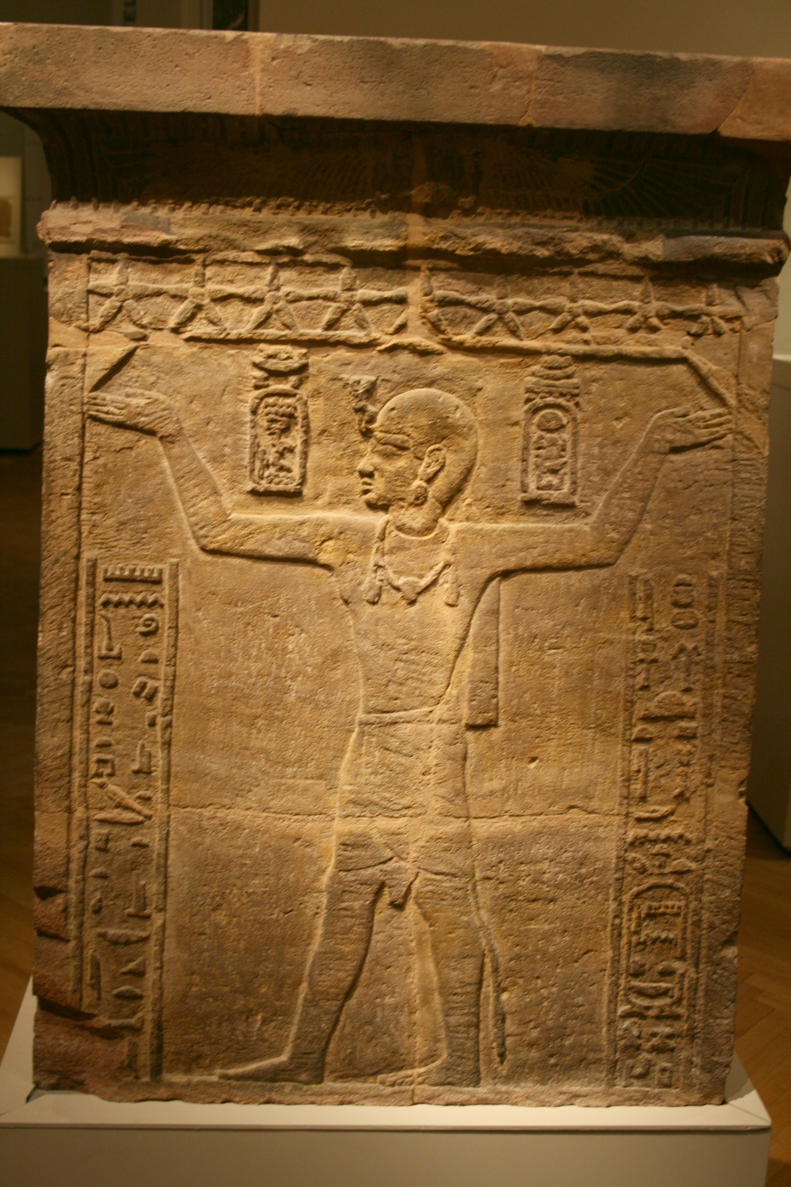 Barkenuntersatz des Natakamani und der Amanitore aus Wad Ban Naga (heute: Ägyptisches Museum Berlin, Inv. Nr. 7261)